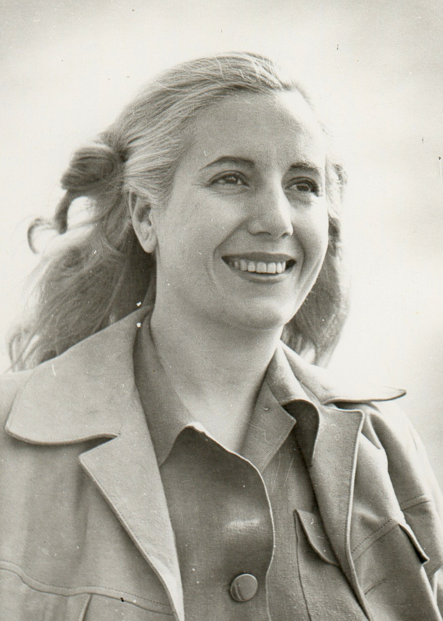 Evita